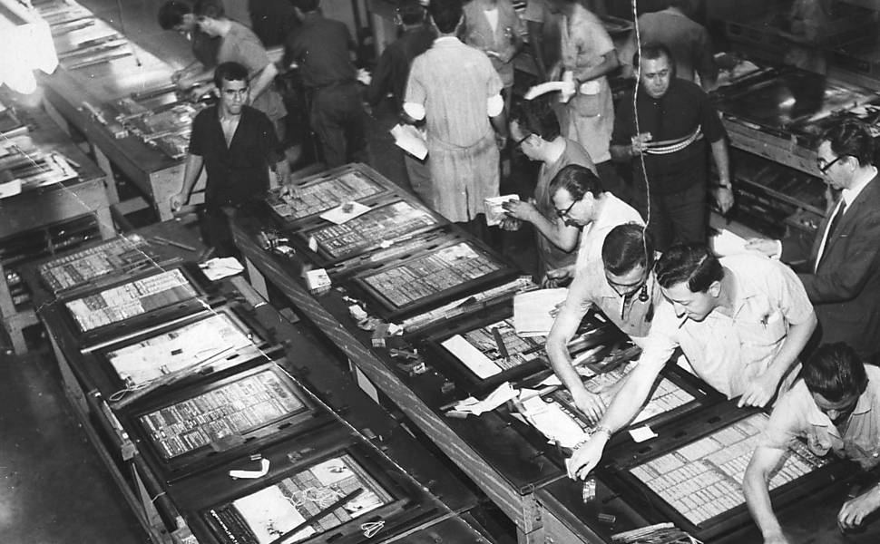 Funcionários fazem a composição a chumbo das páginas do jornal, no final dos anos 50